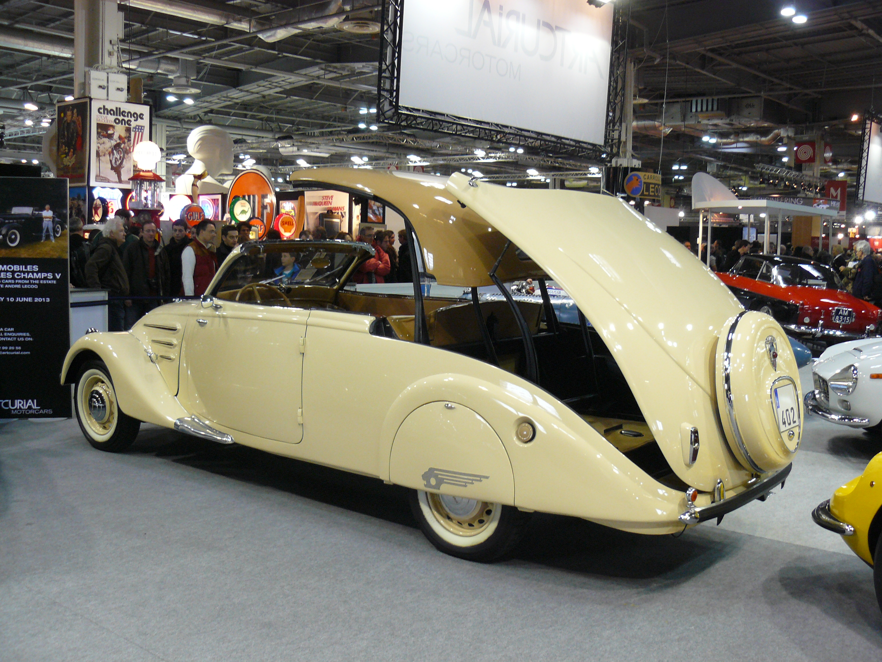 Retromobile 2013